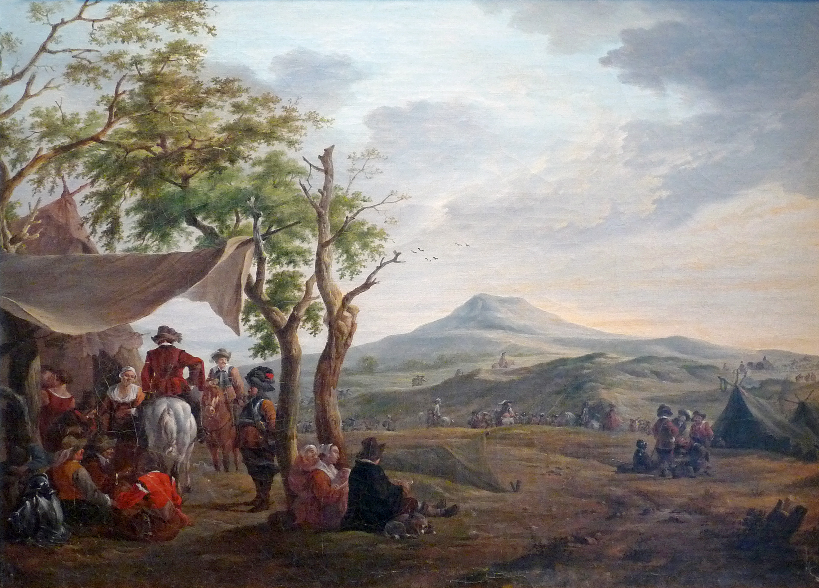 Charles Eschard, Halte militaire - Paysage, Musée barrois (Bar-le-Duc)